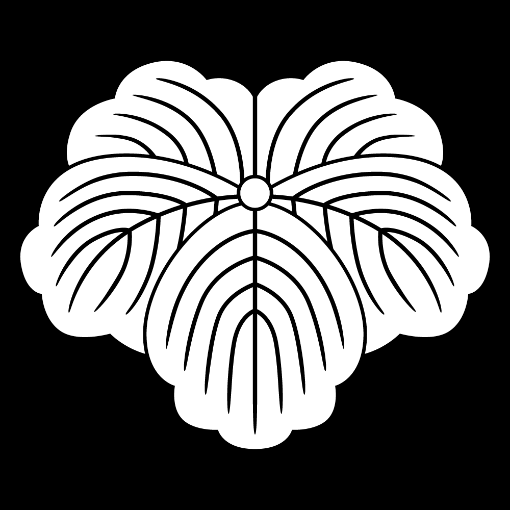 家紋「蔦」の一種。蔦紋。十大紋の一つとして高い普及率を誇る定番の家紋の一つ。